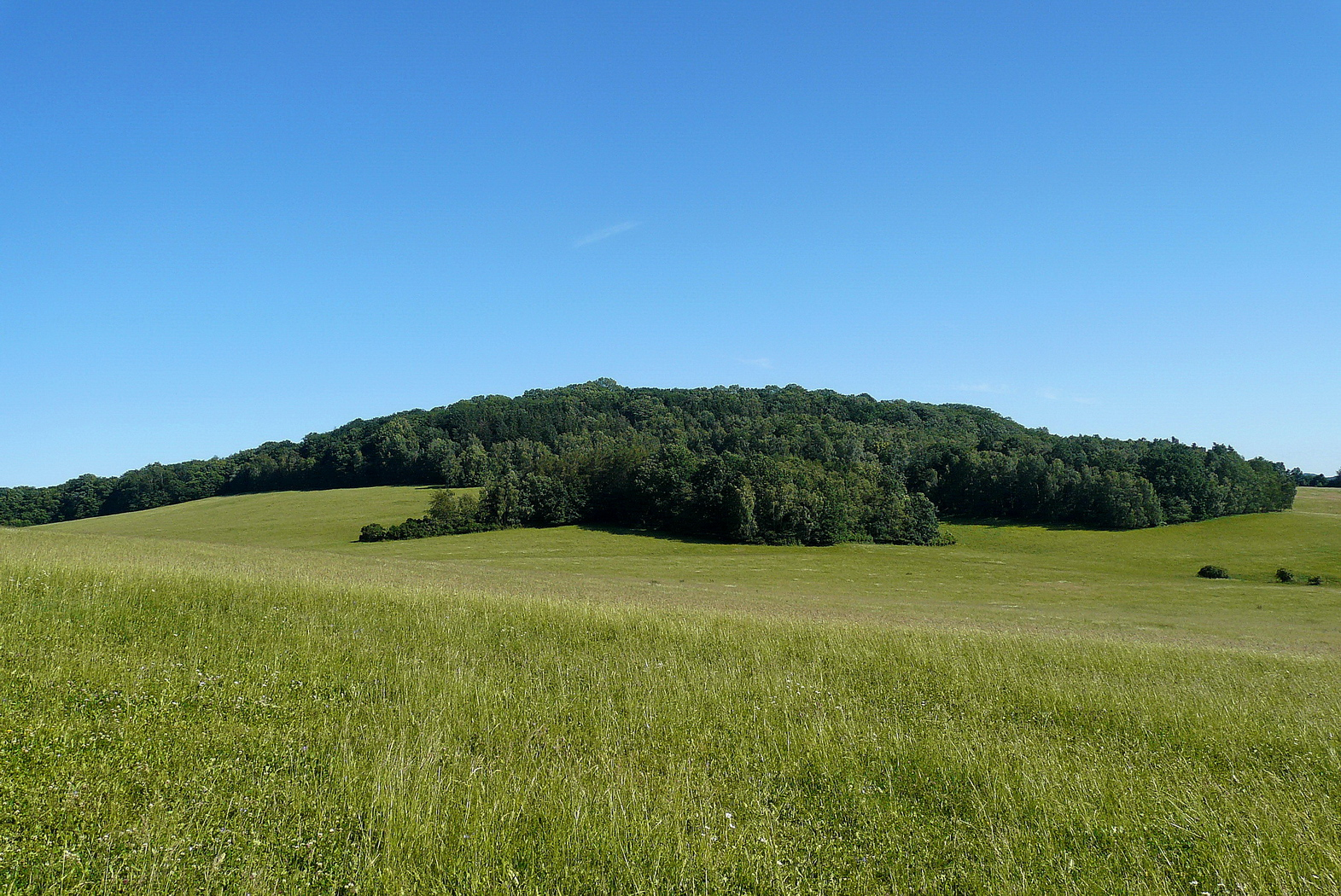 Dlouhý vrch od Štrausova vrchu